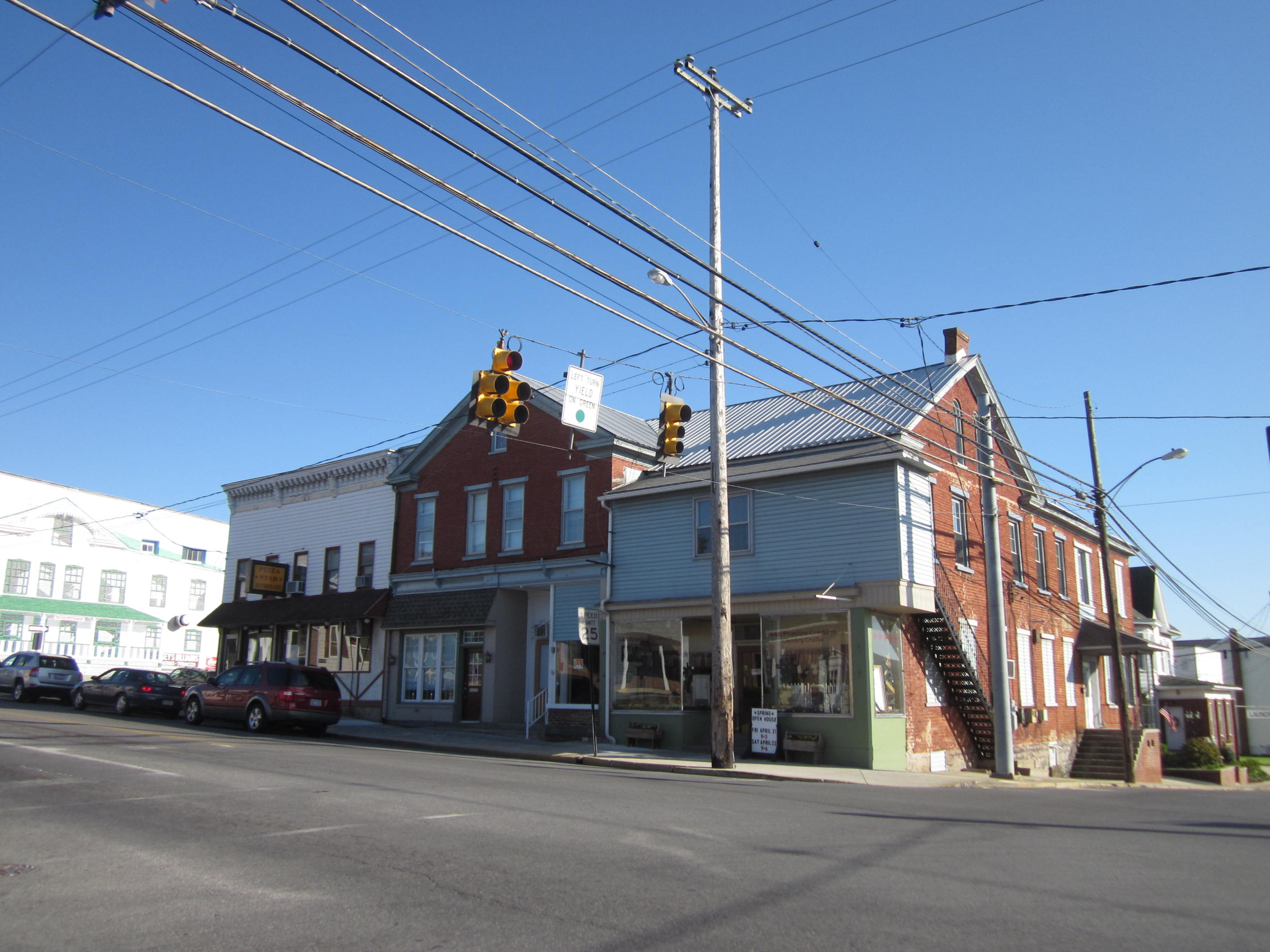 Martinsburg, Pennsylvania